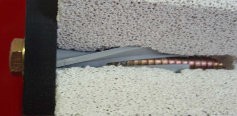 Fischer GB dübel